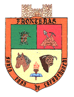 Escudo del municipio sonorense.